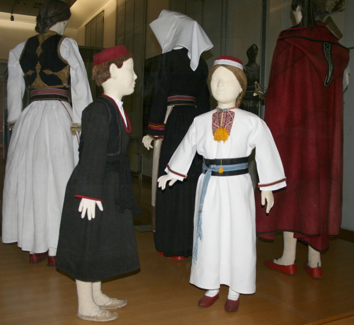 snimljeno tijekom Noći muzeja u Etnografskom muzeju u Zagrebu